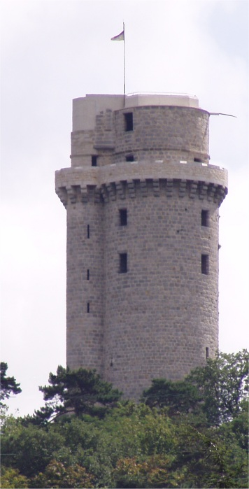 tour de montlhéry après restauration de 2003-2004 - photo personnelle J. THURION faite le 15/08/04 Statut : GFDL